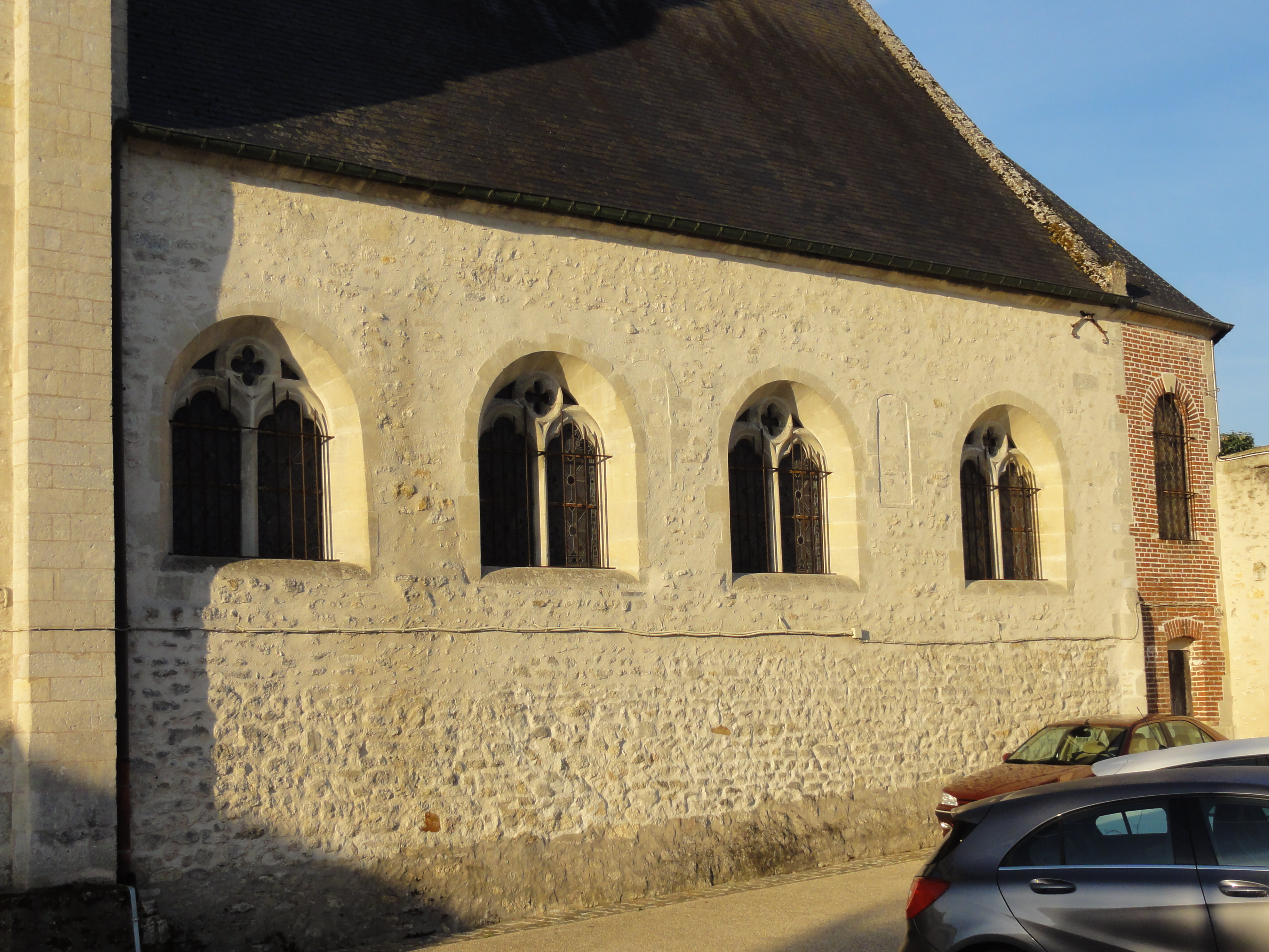 Église Notre-Dame de Chamant (voir titre).